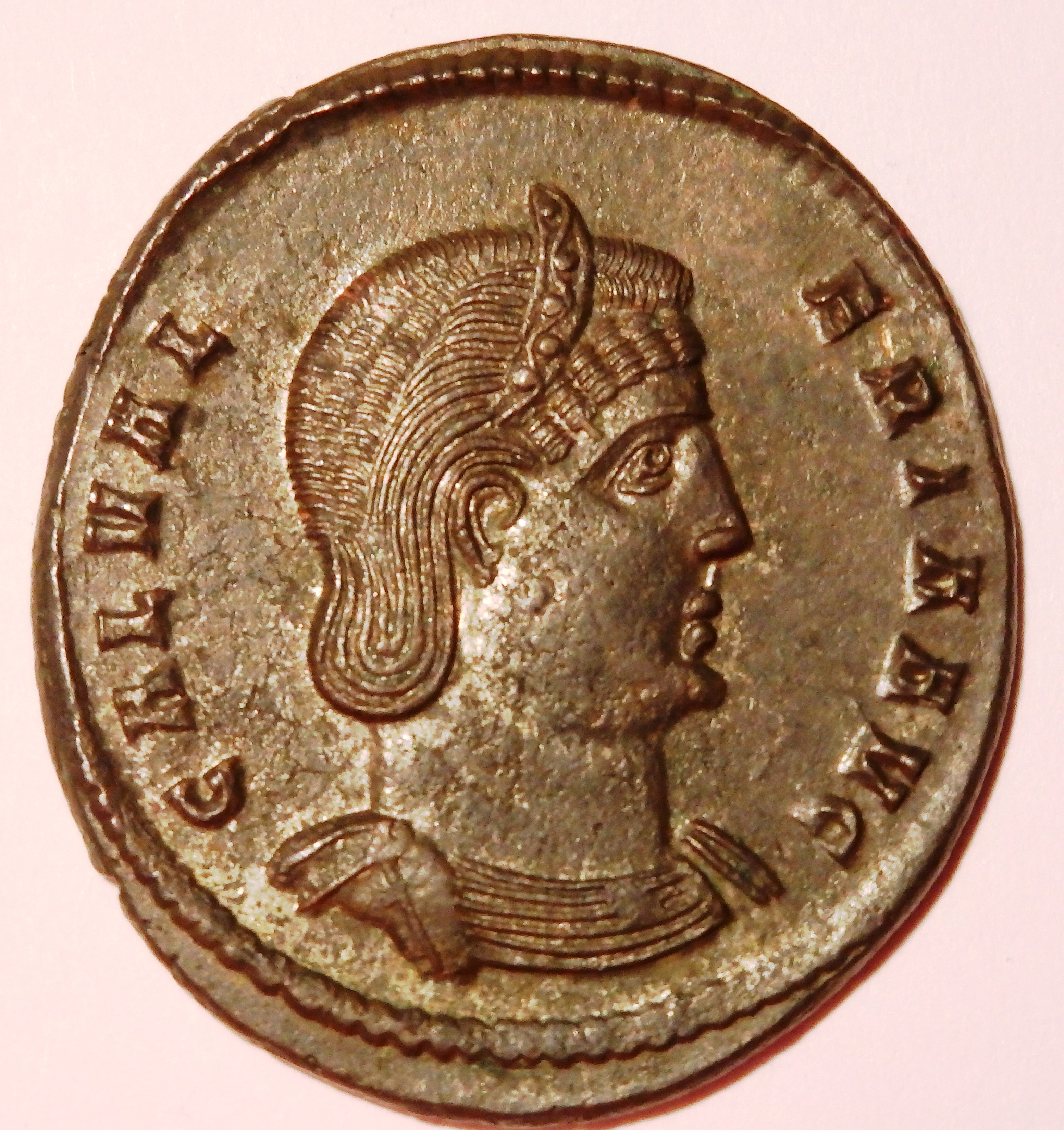 Galeria Valeria auf Bronzemünze, Kampmann 123.2